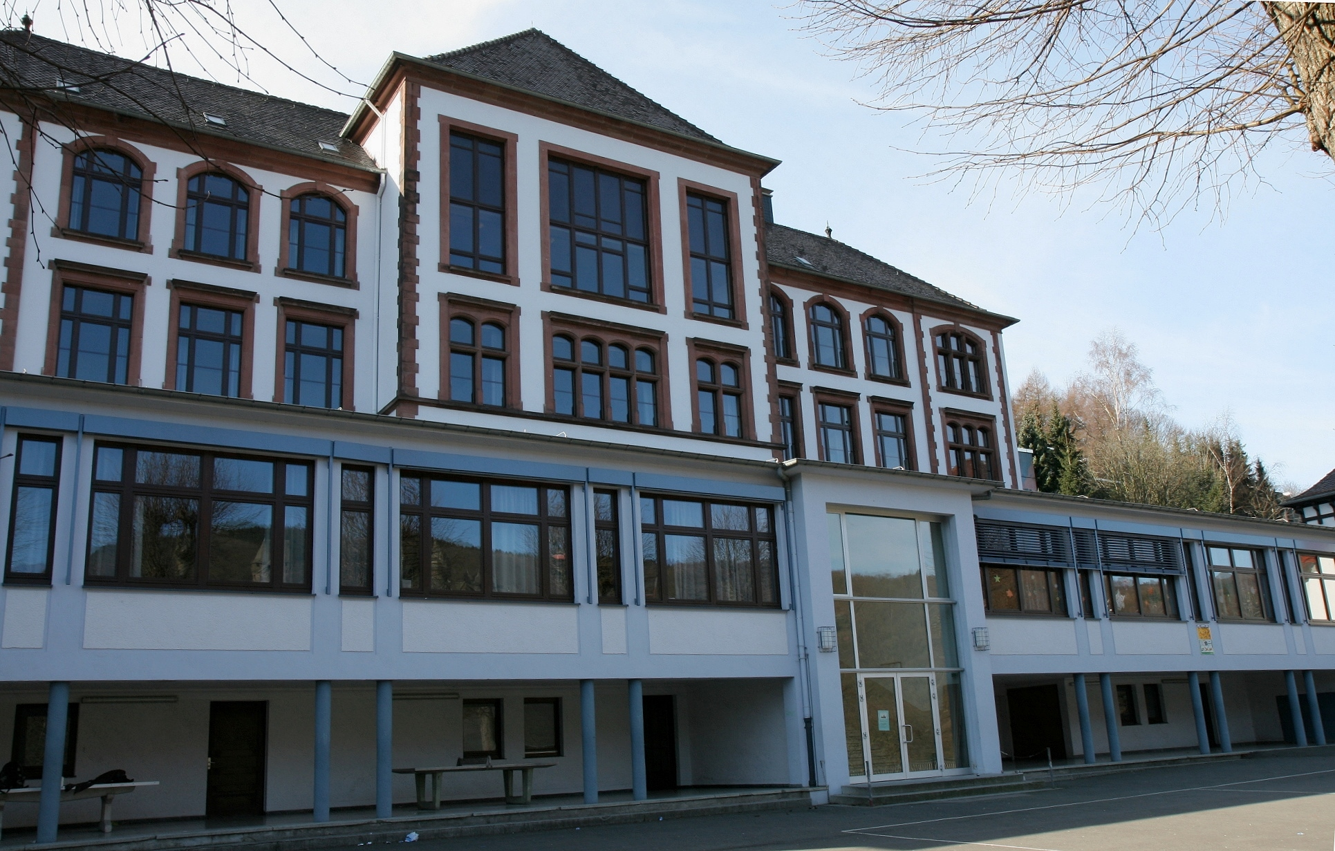 Burggymnasium in Altena.